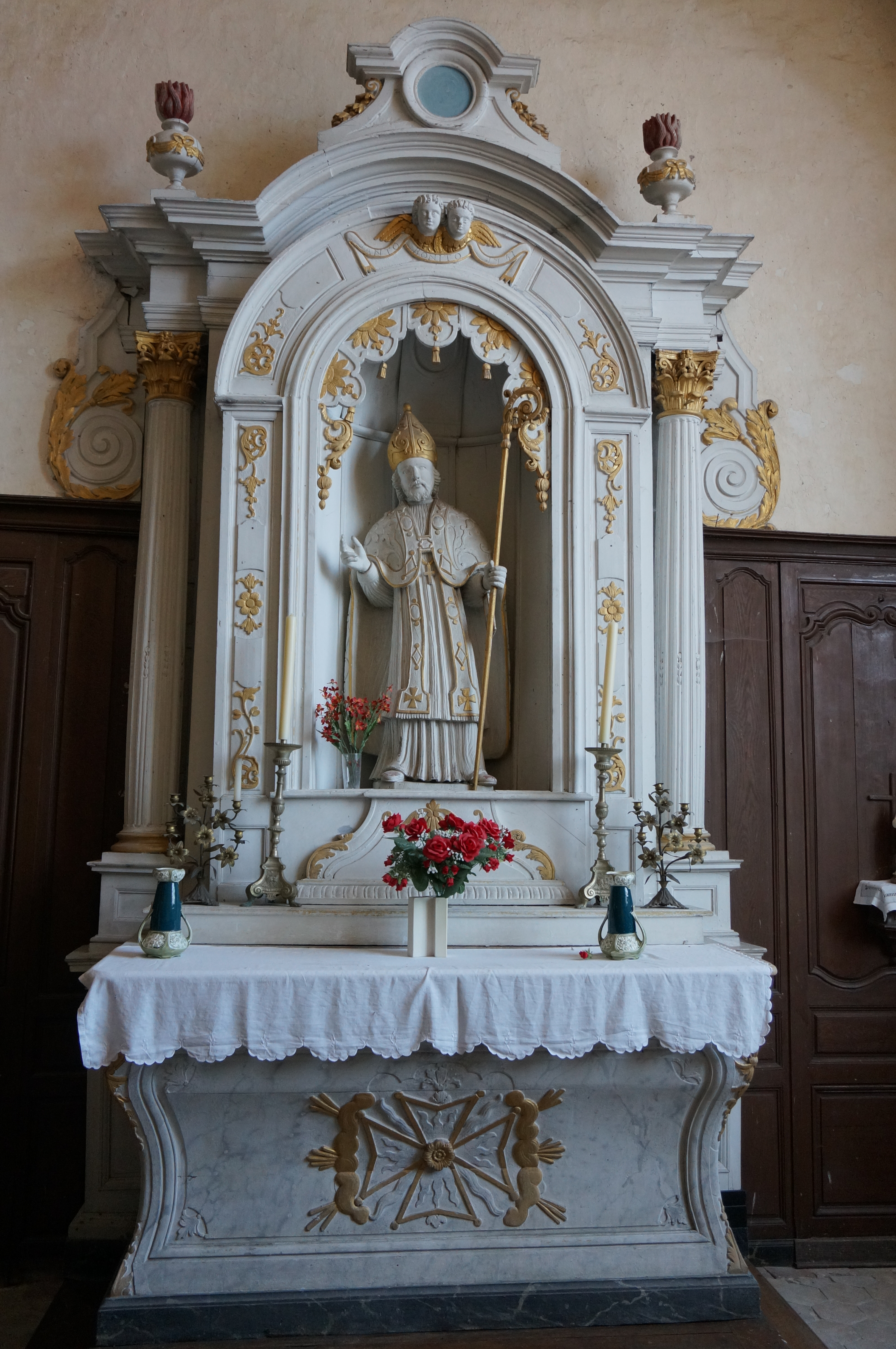 en l'Église Saint-Alpin de Villevenard.